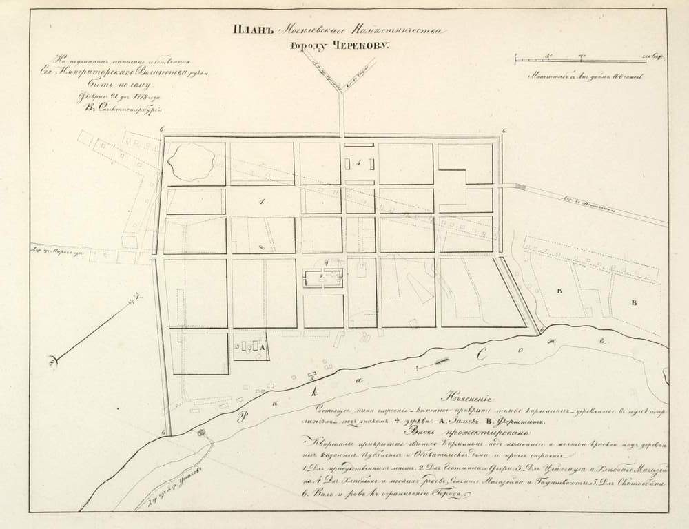 Беларуская (тарашкевіца): Чэрыкаў (Čerykaŭ). Плян места, праект